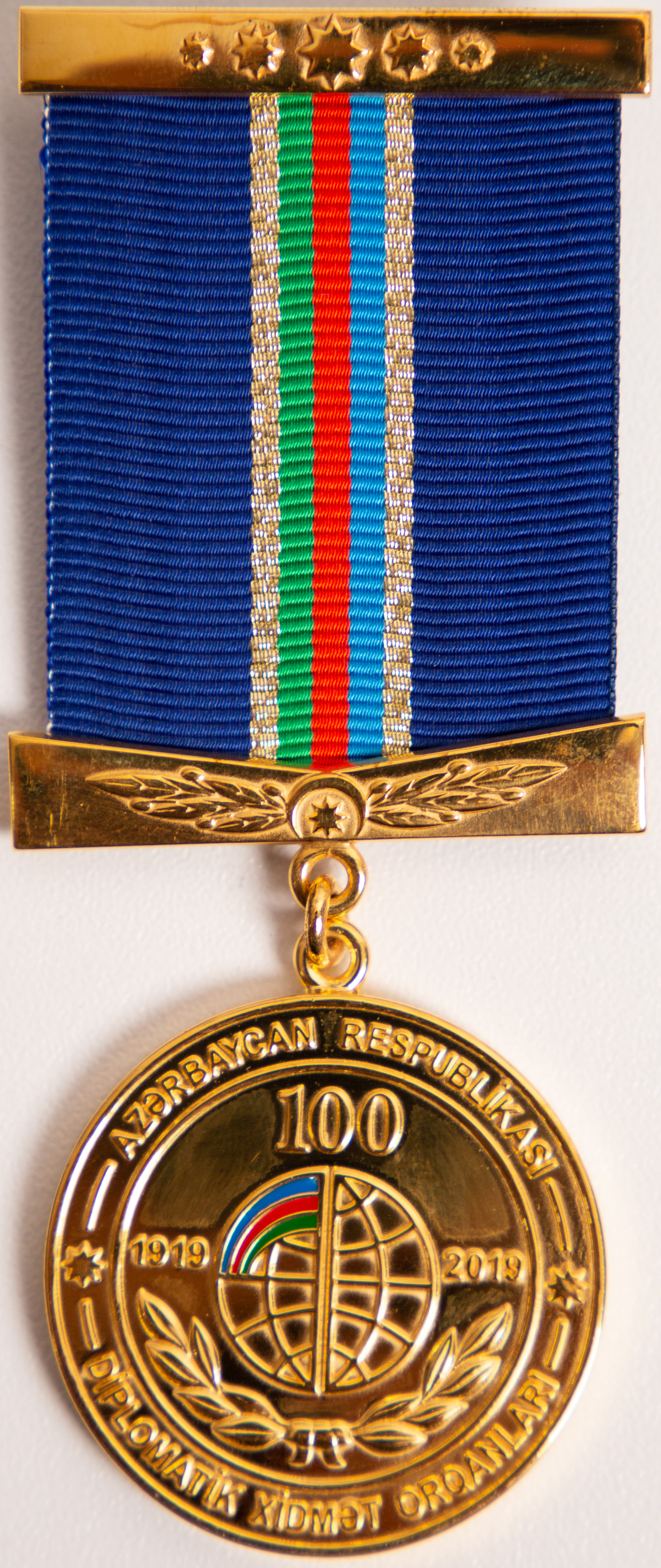 "Azərbaycan Respublikası diplomatik xidmət orqanlarının 100 illiyi (1919-2019)" yubiley medalı